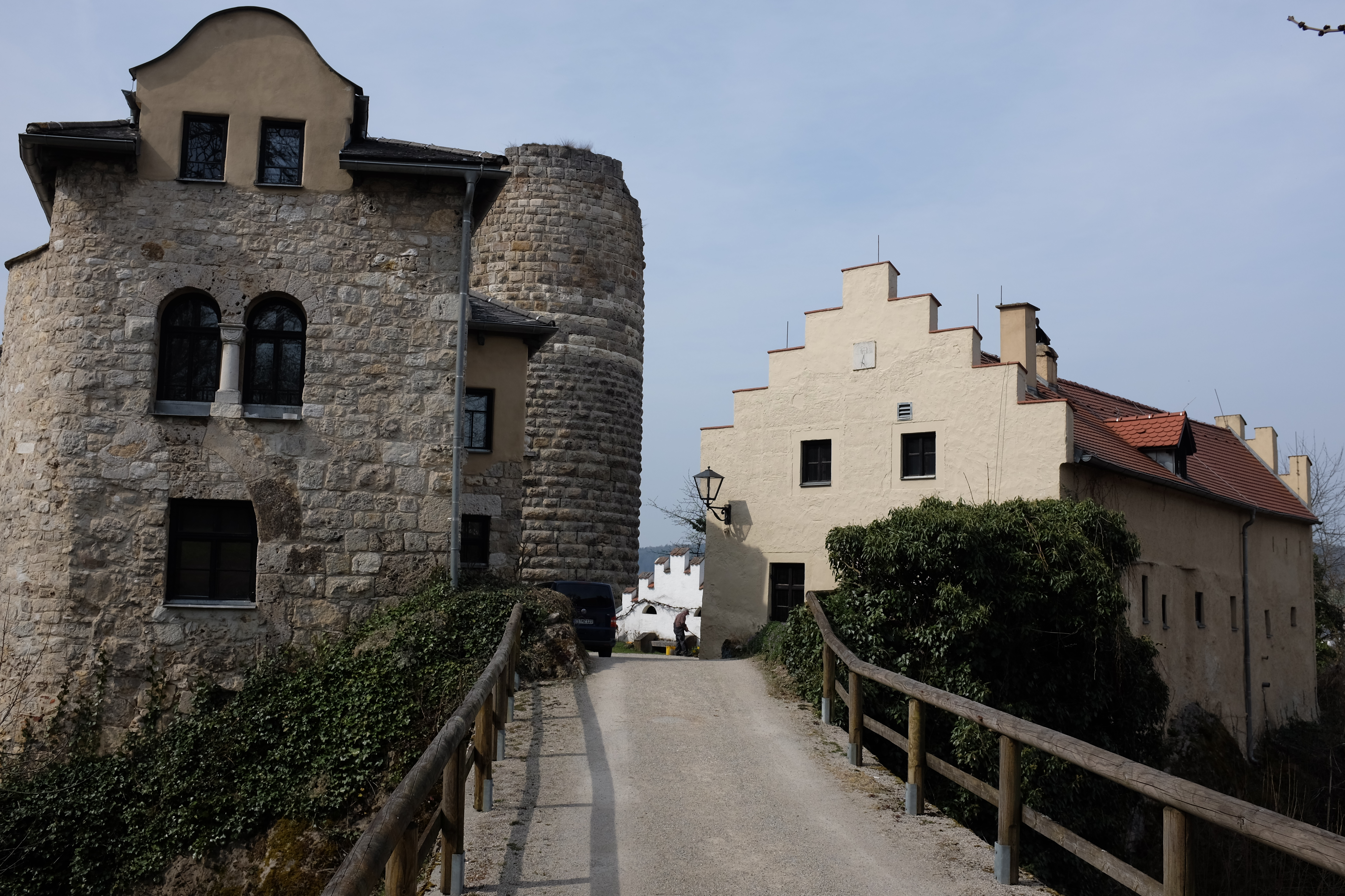 Eingang zur Burg Altmannstein